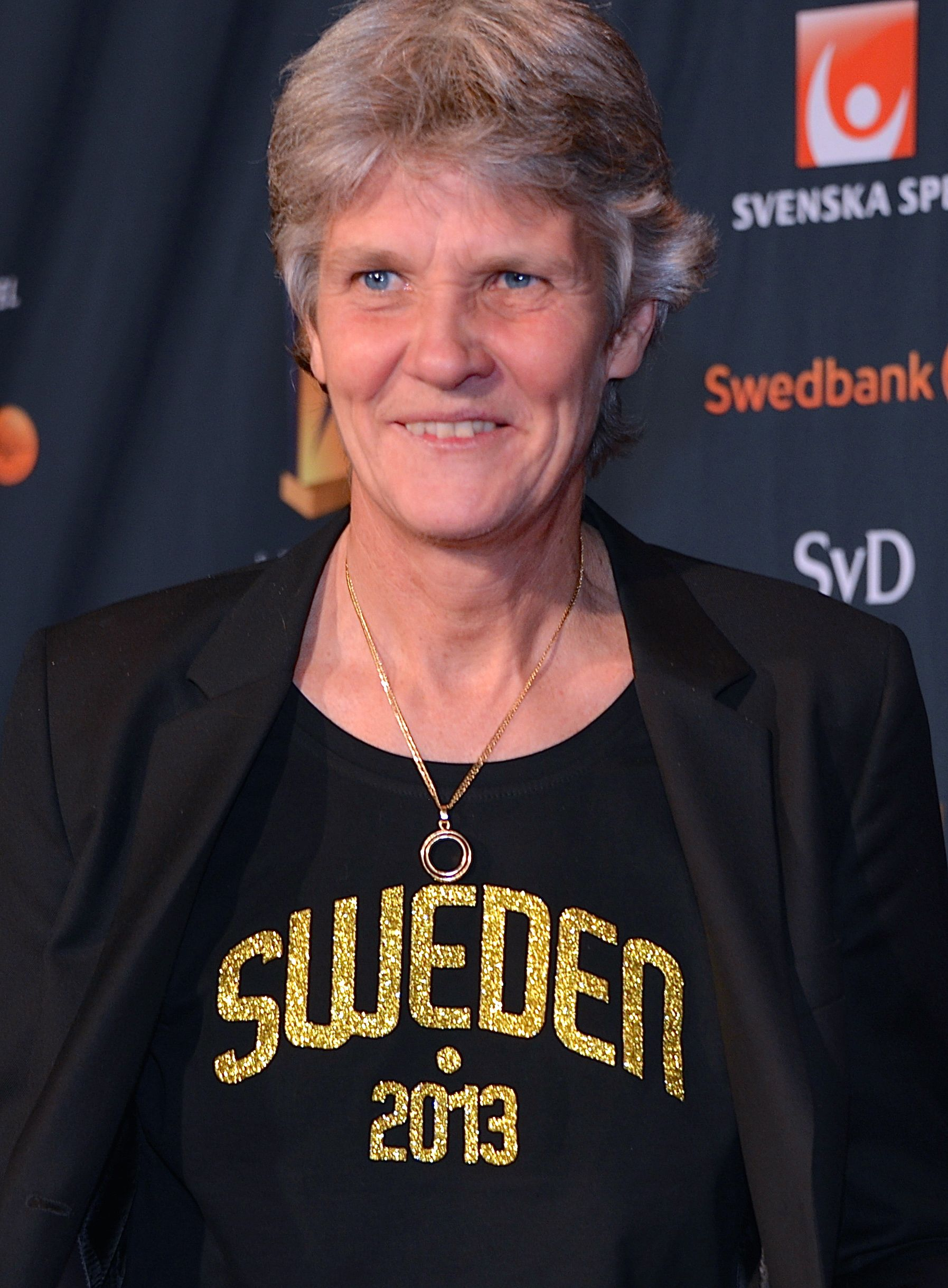 Pia Sundhage på Idrottsgalan på Globen i Stockholm den 14 januari 2013.